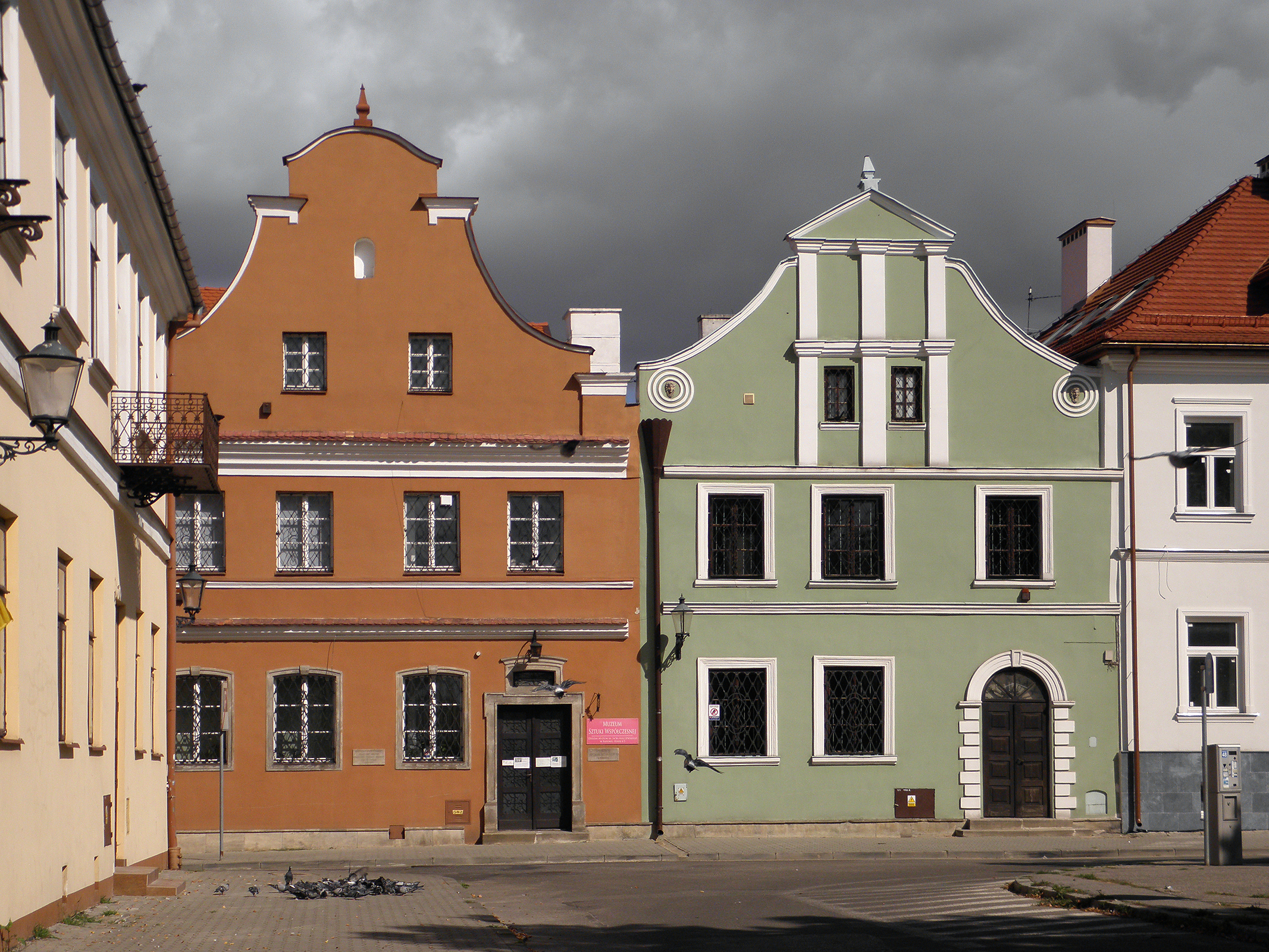 Radom - kamienice Gąski i Esterki.